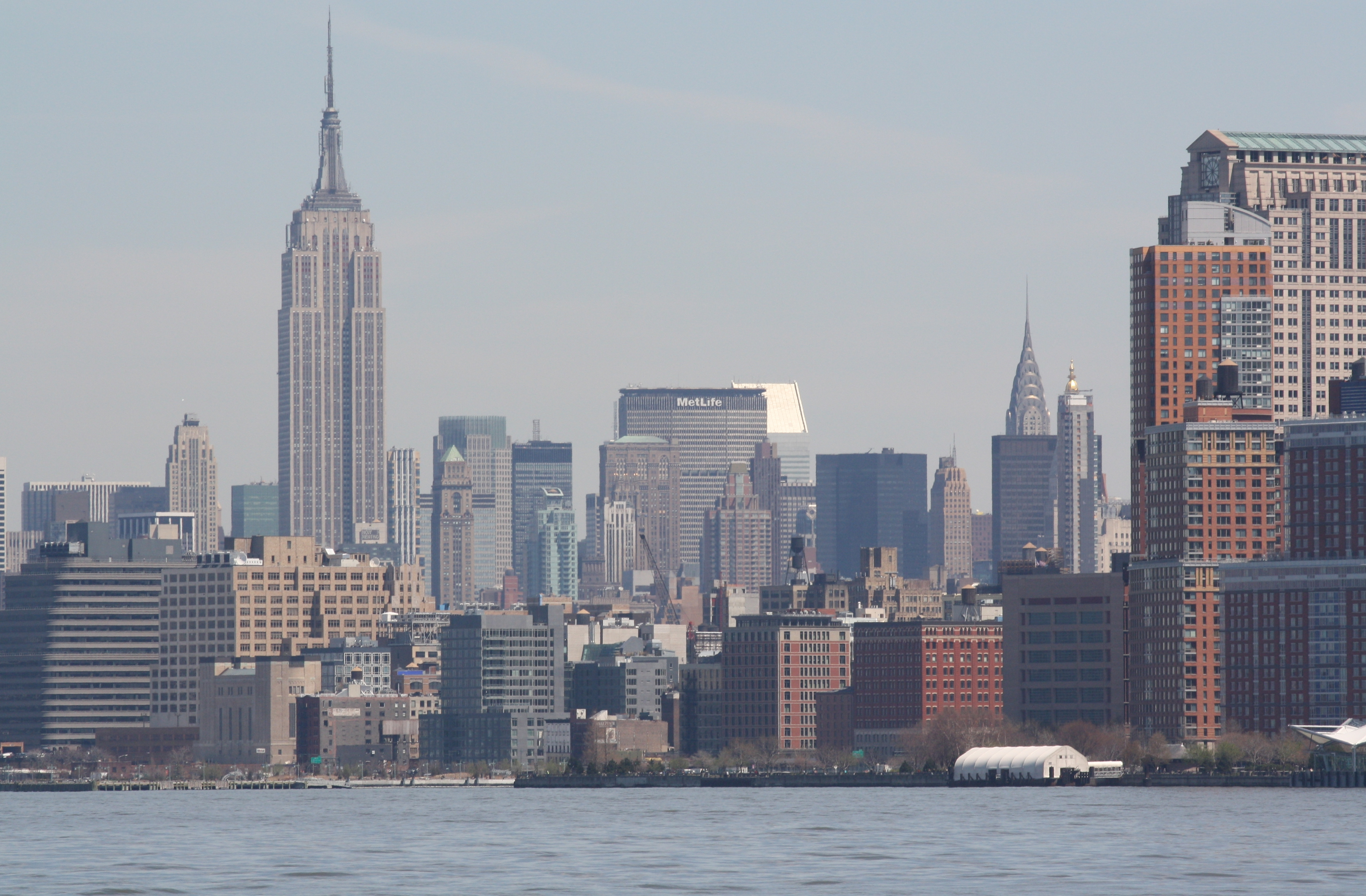 New York City; 2009